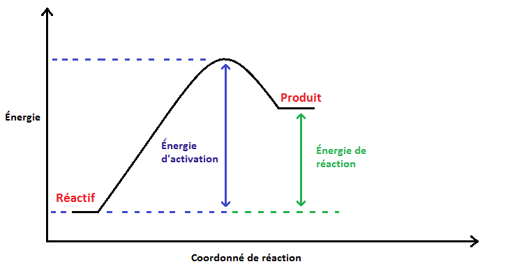 schéma d'une réaction endothermique